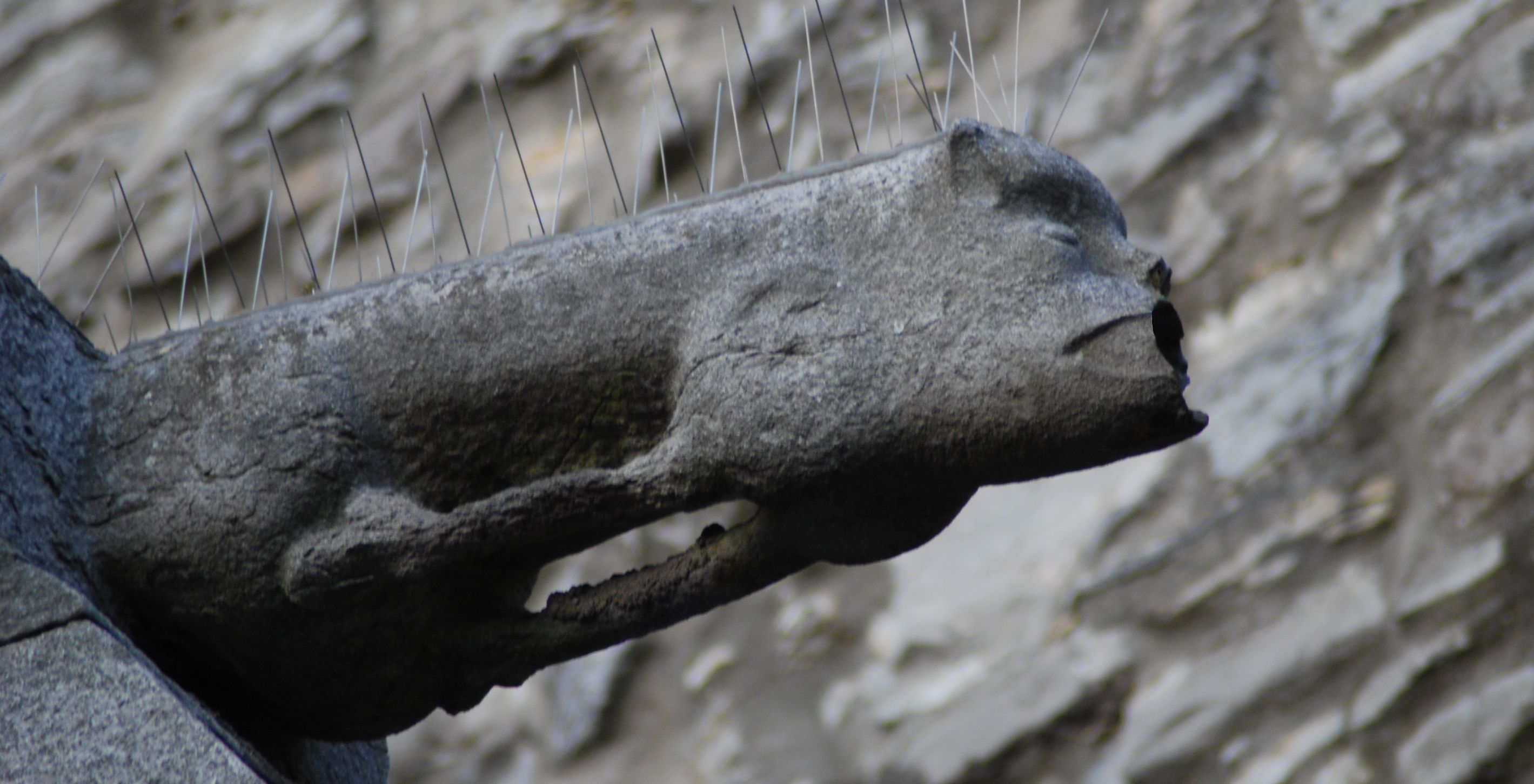 L'unique gargouille de la Collégiale Saint-Vincent à Soignies, Hainaut, Belgique